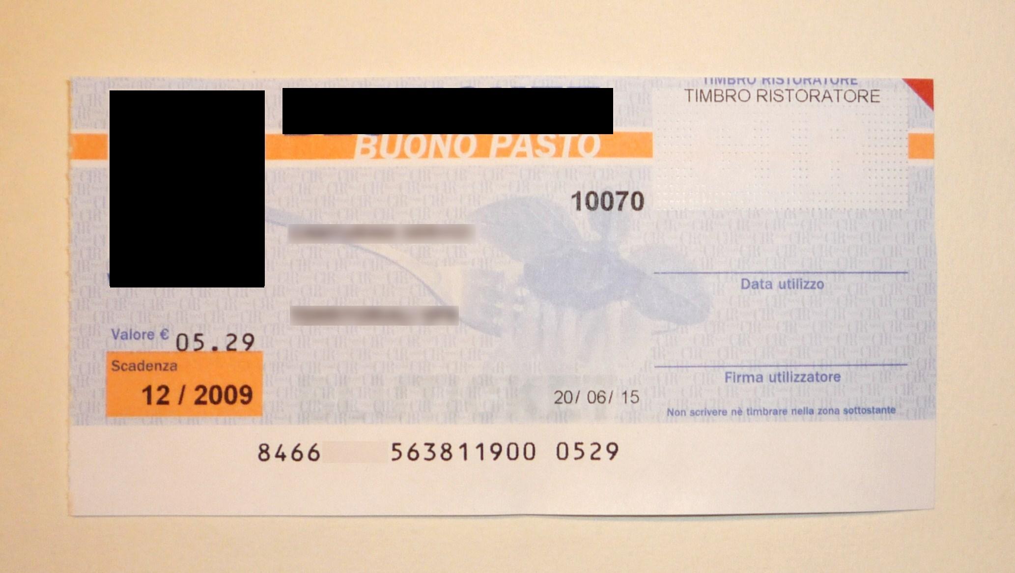 Un buono pasto bluticket